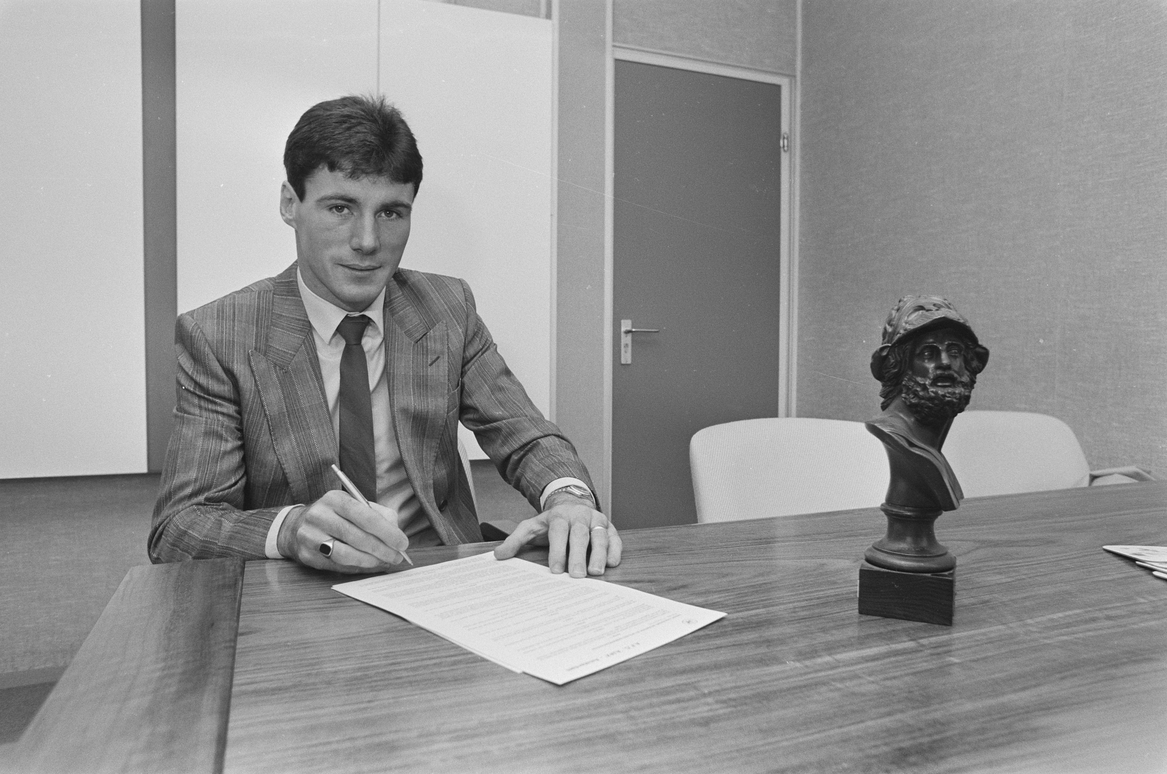 Collectie / Archief : Fotocollectie Anefo Reportage / Serie : [ onbekend ] Beschrijving : Frank Stapleton tekent contract bij Ajax; Stapleton voor Ajax-stadion Datum : 16 juni 1987 Trefwoorden : contracten, sport, voetbal Persoonsnaam : Frank Stapleton Fotograaf : Bogaerts, Rob / Anefo Auteursrechthebbende : Nationaal Archief Materiaalsoort : Negatief (zwart/wit) Nummer archiefinventaris : bekijk toegang 2.24.01.05 Bestanddeelnummer : 934-0128